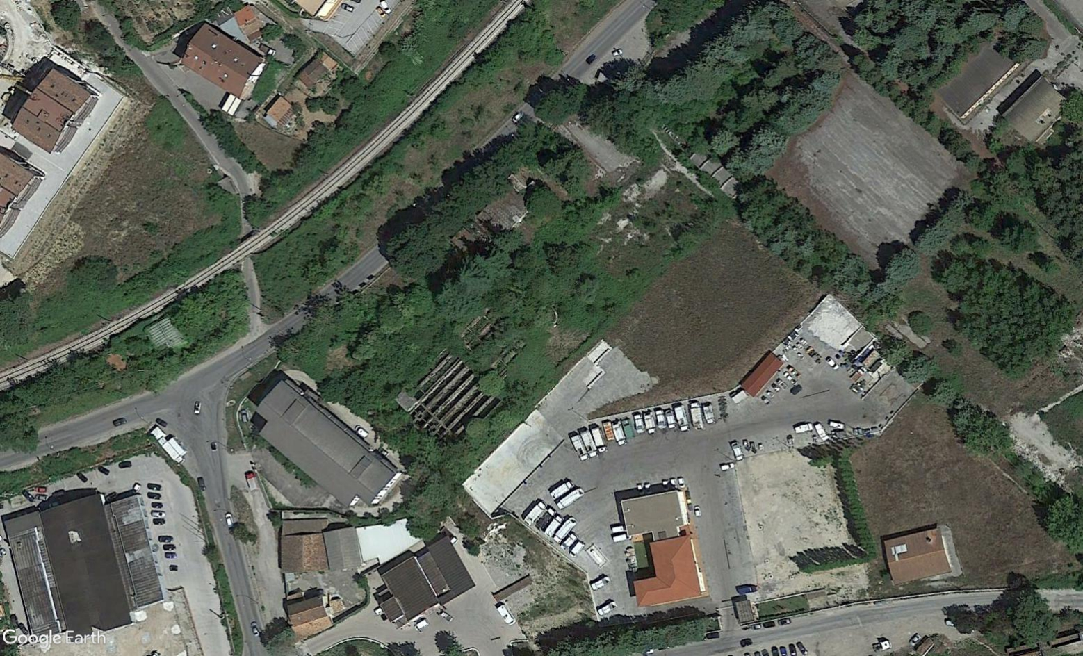 Vista dell'impianto da ortofoto AGEA 2017